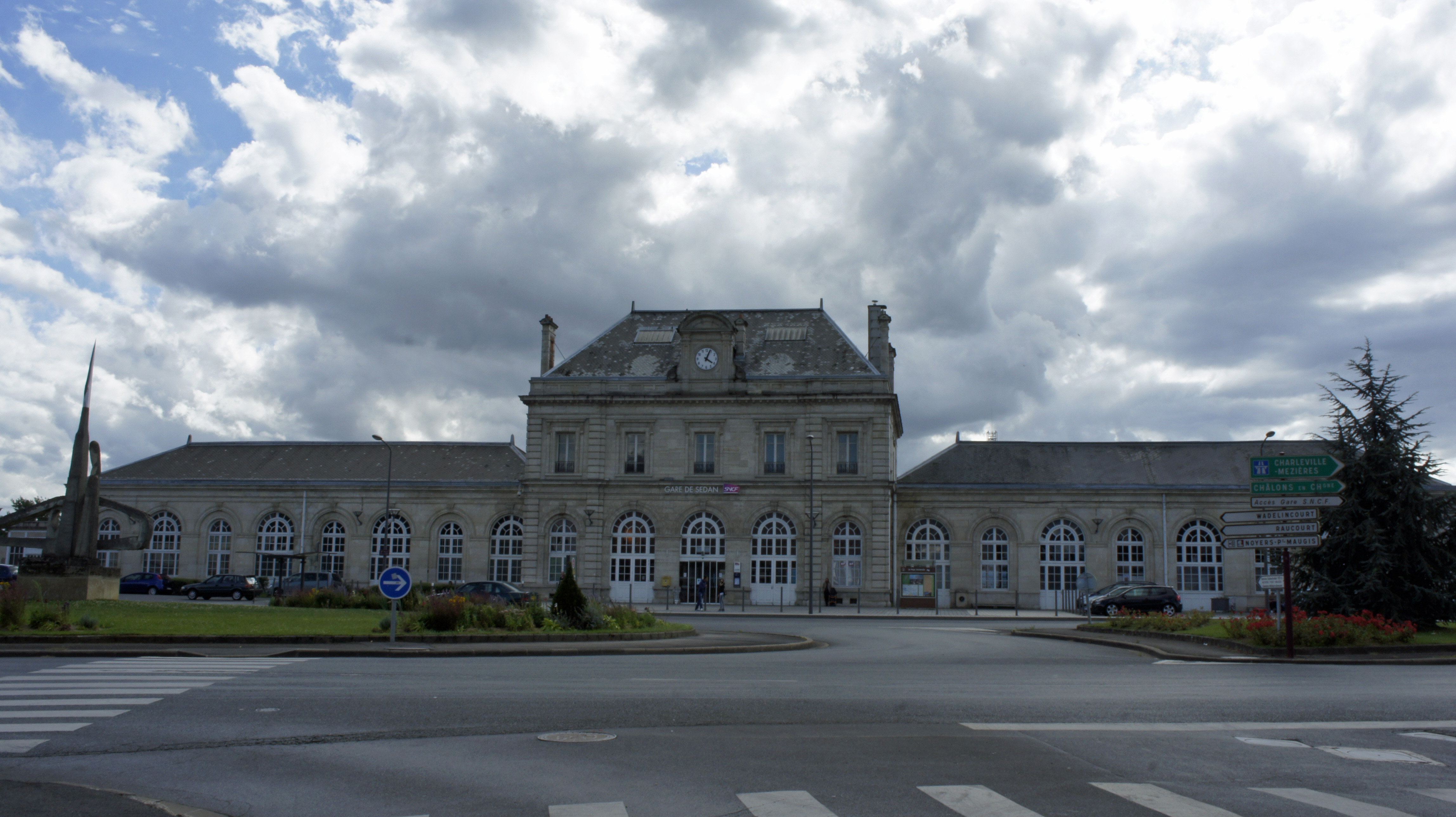 Vue de la Gare_de Sedan et de la statue sur la place